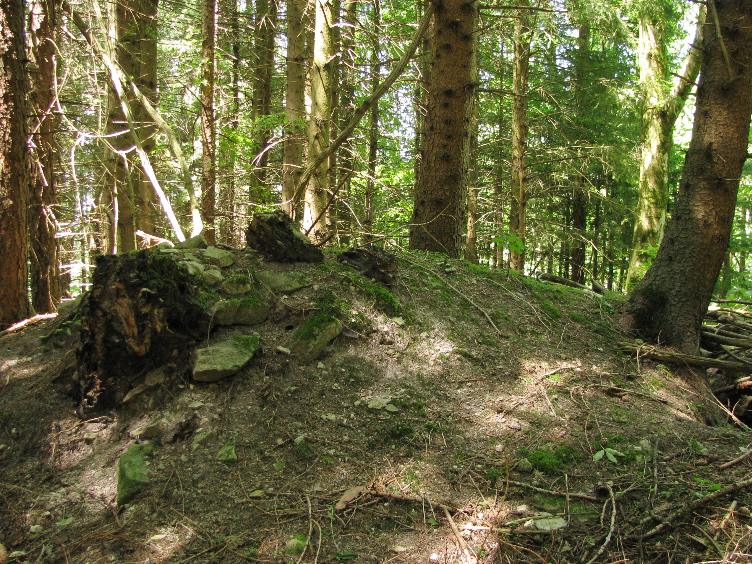 Burgstall Willenberg, Mauerreste